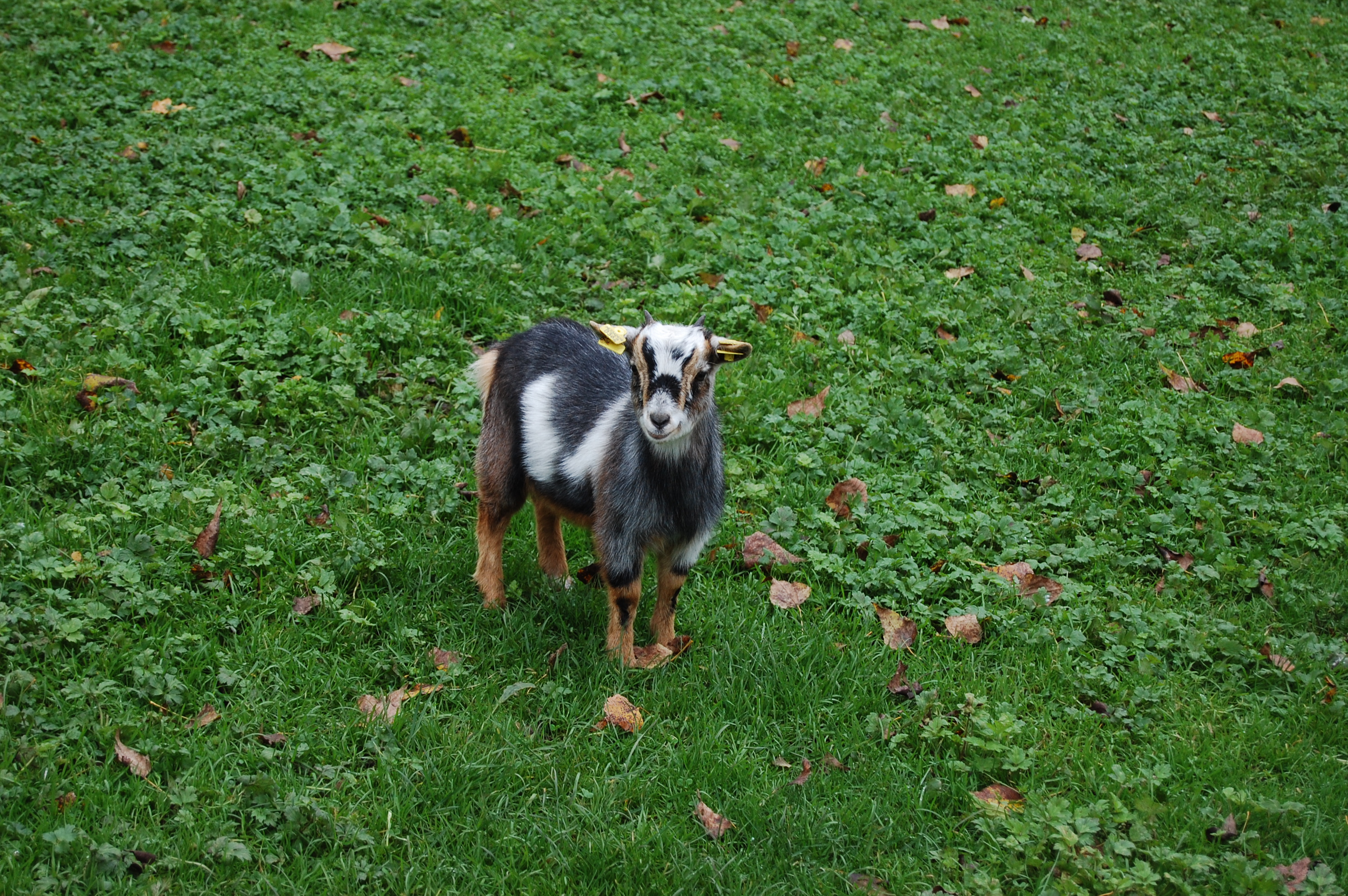 Een jong geitje